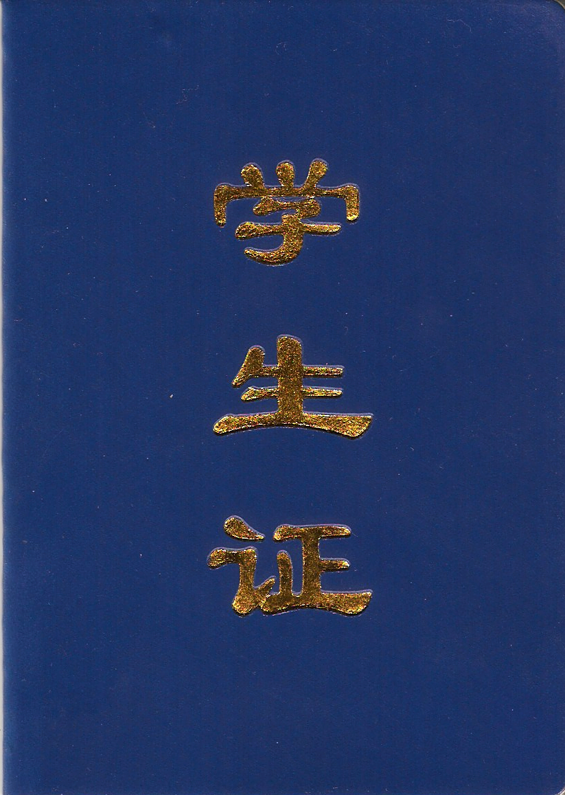 辽宁省鞍山市的一份学生证封面